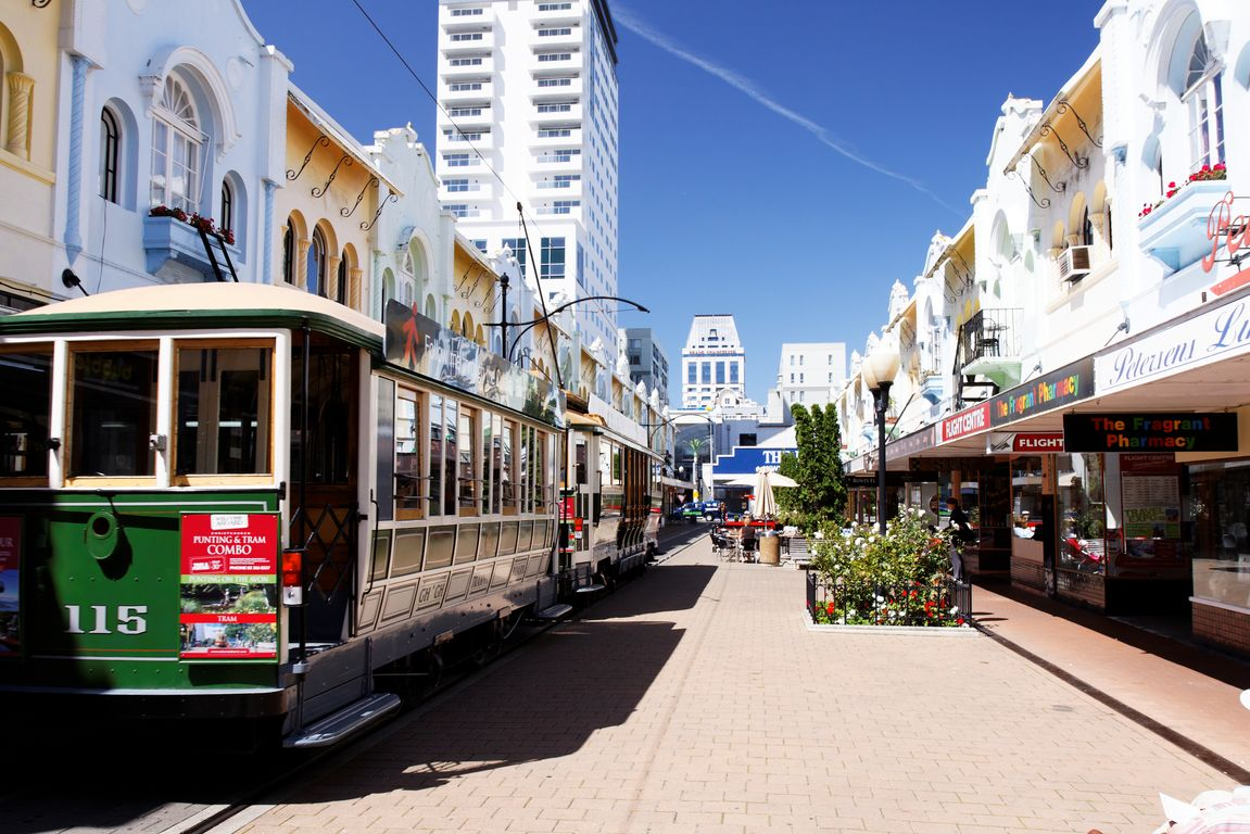 20100131-16-Christchurch tram in New Regent Street